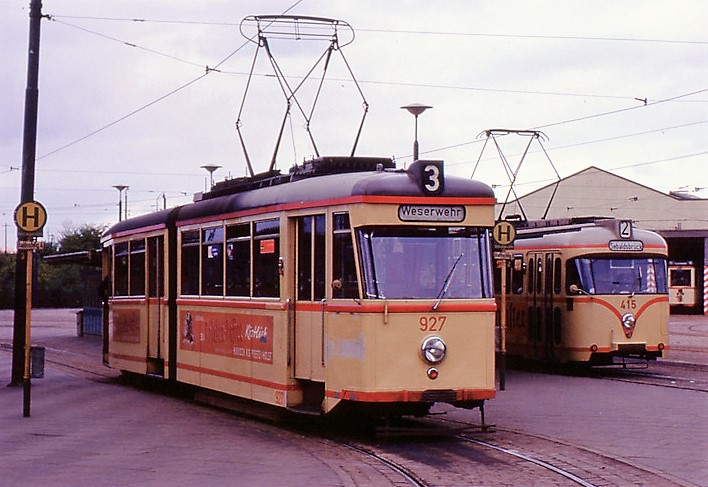 Straßenbahn Bremen, Wagen Nr. 927 (Typ GT3) am Sonntag, den 18. Mai 1963 auf der Linie 3 in der Wendeschleife Gröpelingen